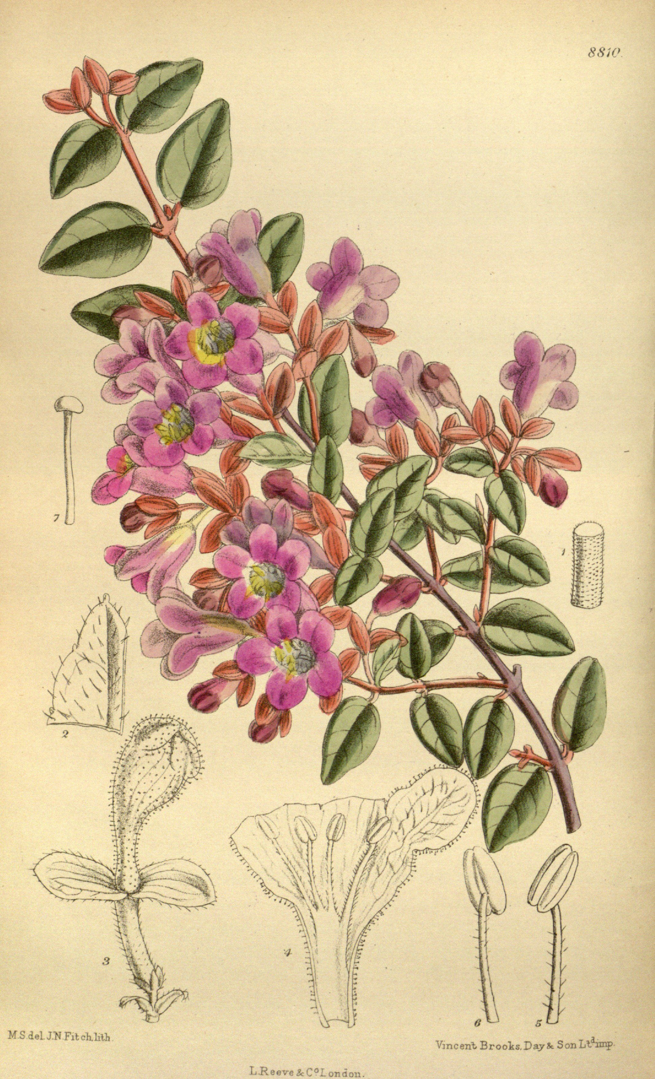 Abelia longituba (= Abelia uniflora), Linnaeaceae